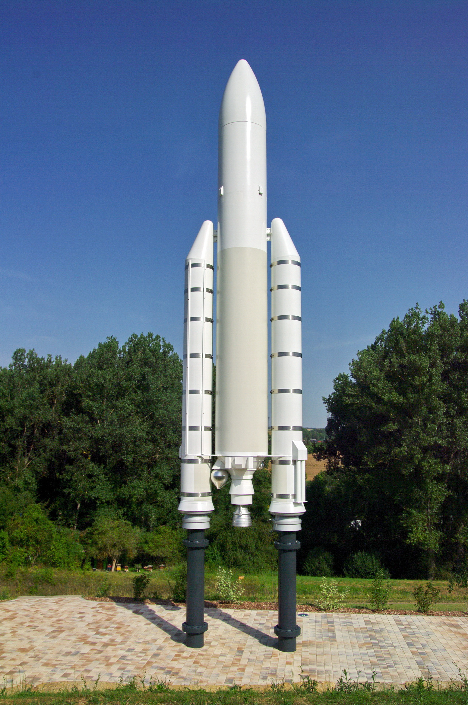 Ariane-V-Modellrakete M 1:4.29 bei Hardheim, aufgestellt zu Ehren von Walter Hohmann